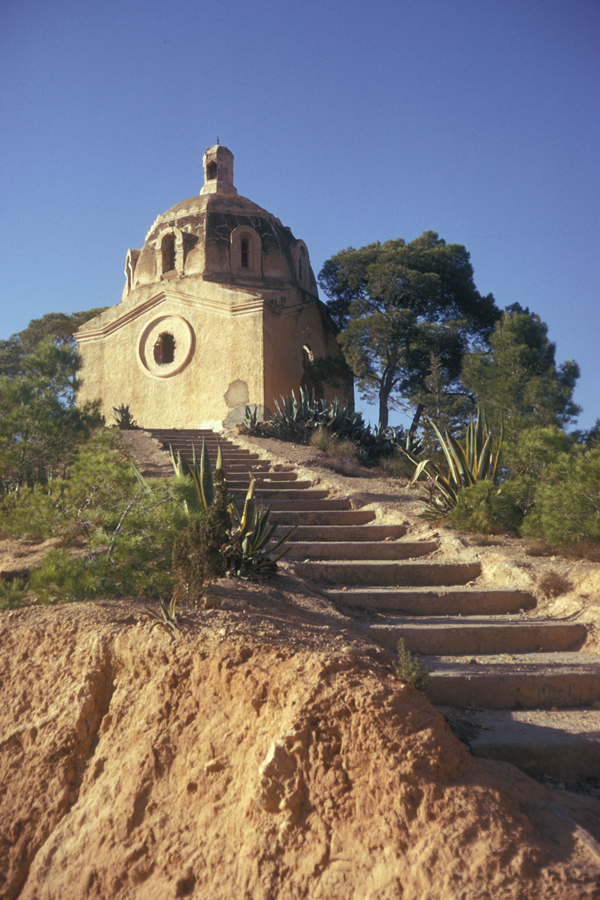 Ruine de la chapelle Notre Dame du Bon Remède sur le Djebel Touakès (Sig, Algérie) vers 1975. L'intérieur est vide.